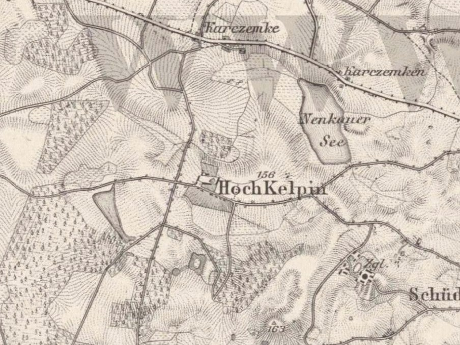 Kiełpino Górne i jezioro Jasień (Nenkauer See) na mapie z 1901 r.